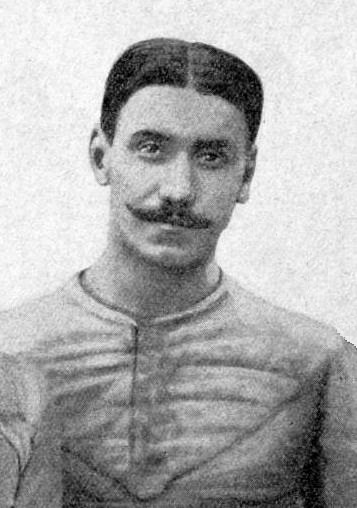 René Duval, capitaine du Stade français en 1911 et 1912, et de l'équipe de France en 1911.